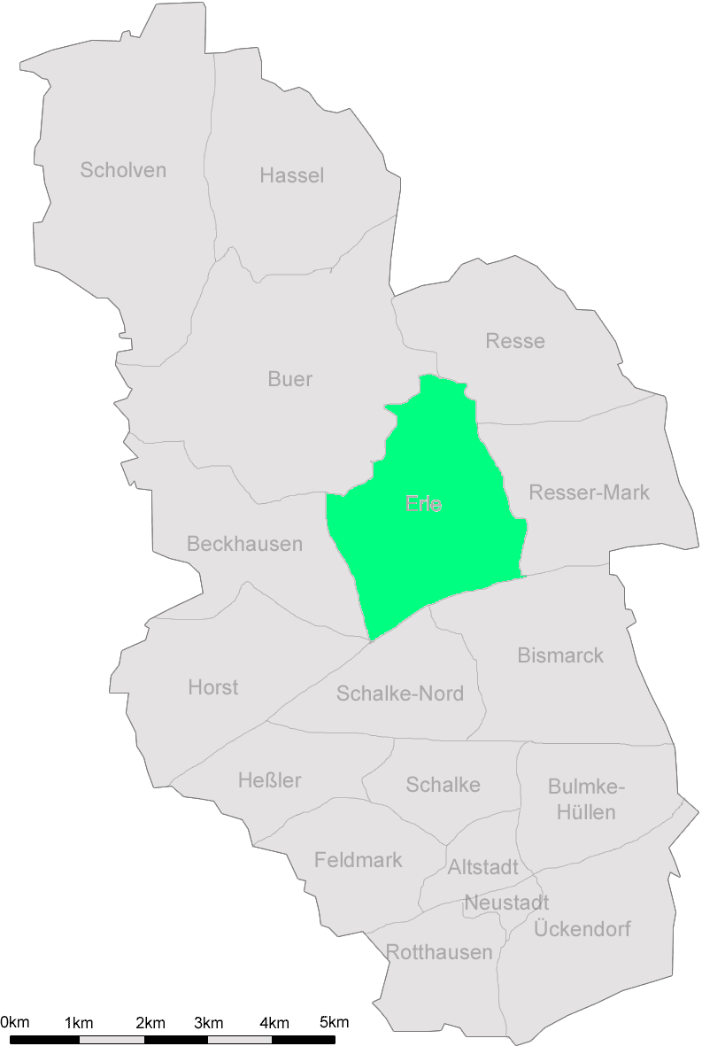 Beschreibung: Von Marc Schuelper erstelle Karte von Gelsenkirchen mit den 18 Stadtteilen. Stadtteil Beckhausen markiert. Description: By Marc Schuelper provided map of Gelsenkirchen with its 18 quarters. Highlighted quarter Beckhausen.